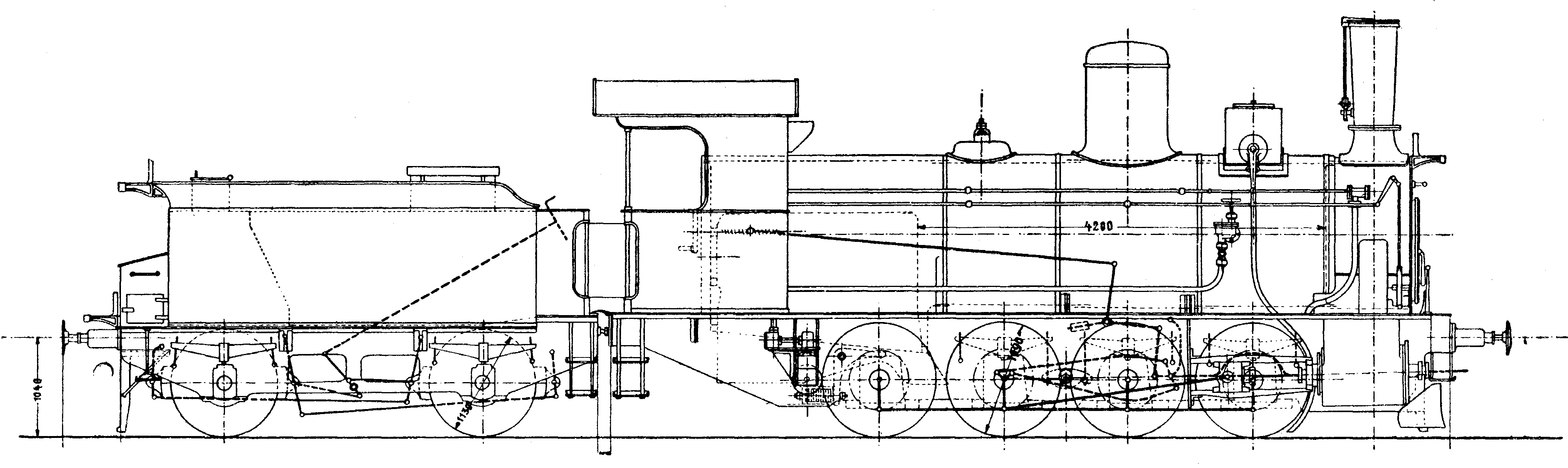 4/4-gekuppelte Lokomotive der Gotthardbahn mit Schlepttender Serie D 4/4 Nr. 101–136, gebaut 1882 bis 1890 von der Lokomotivfabrik Maffei in München